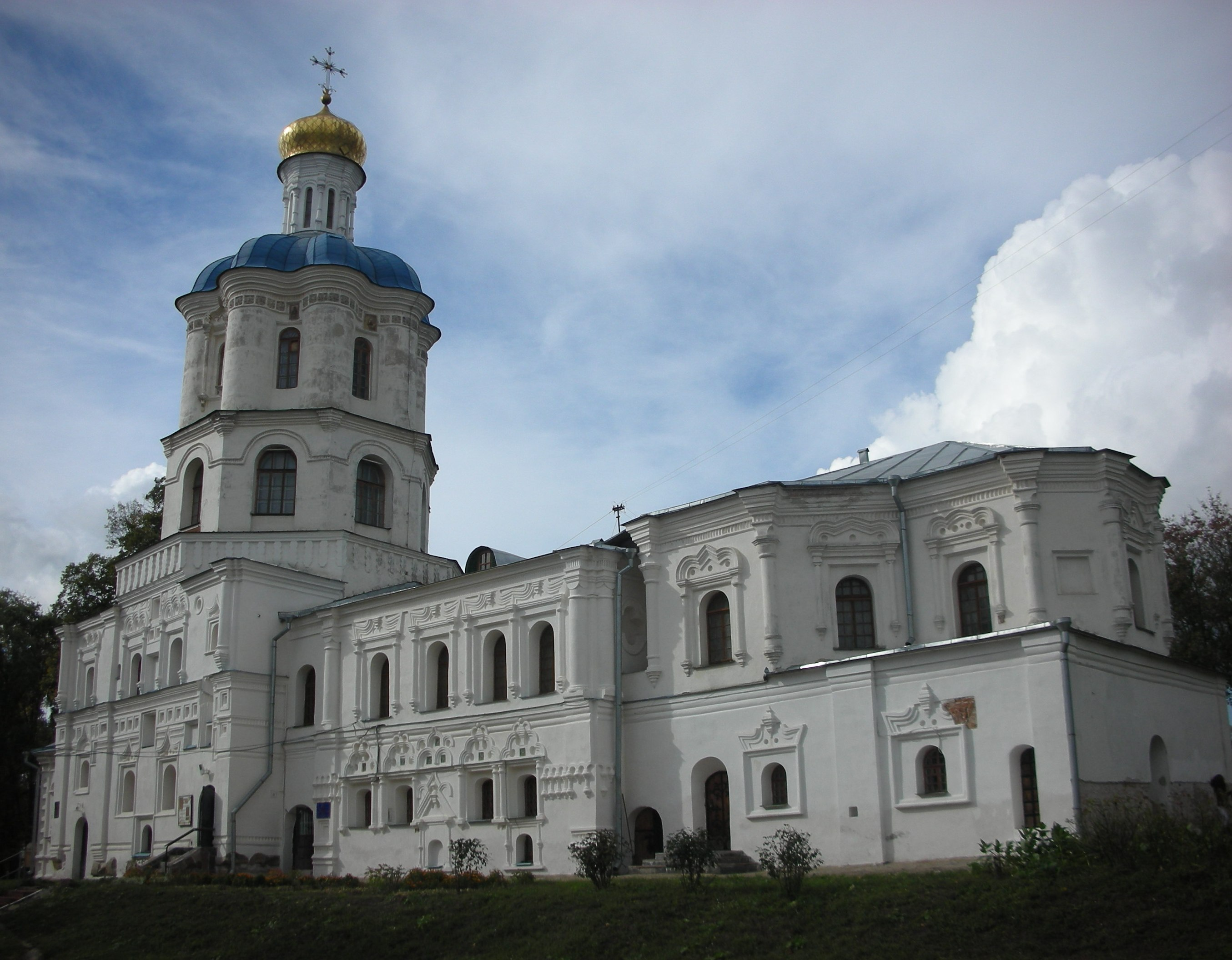 Колегіум (мур.), 1672-1702р.р.; Чернігів, вул.Спасо-Преображенська, 1